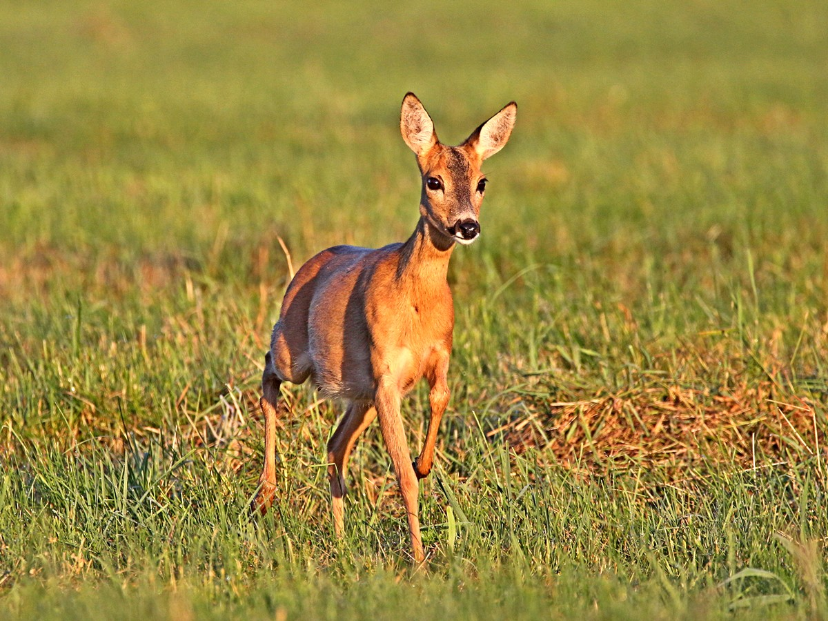 Reh in Mecklenburg